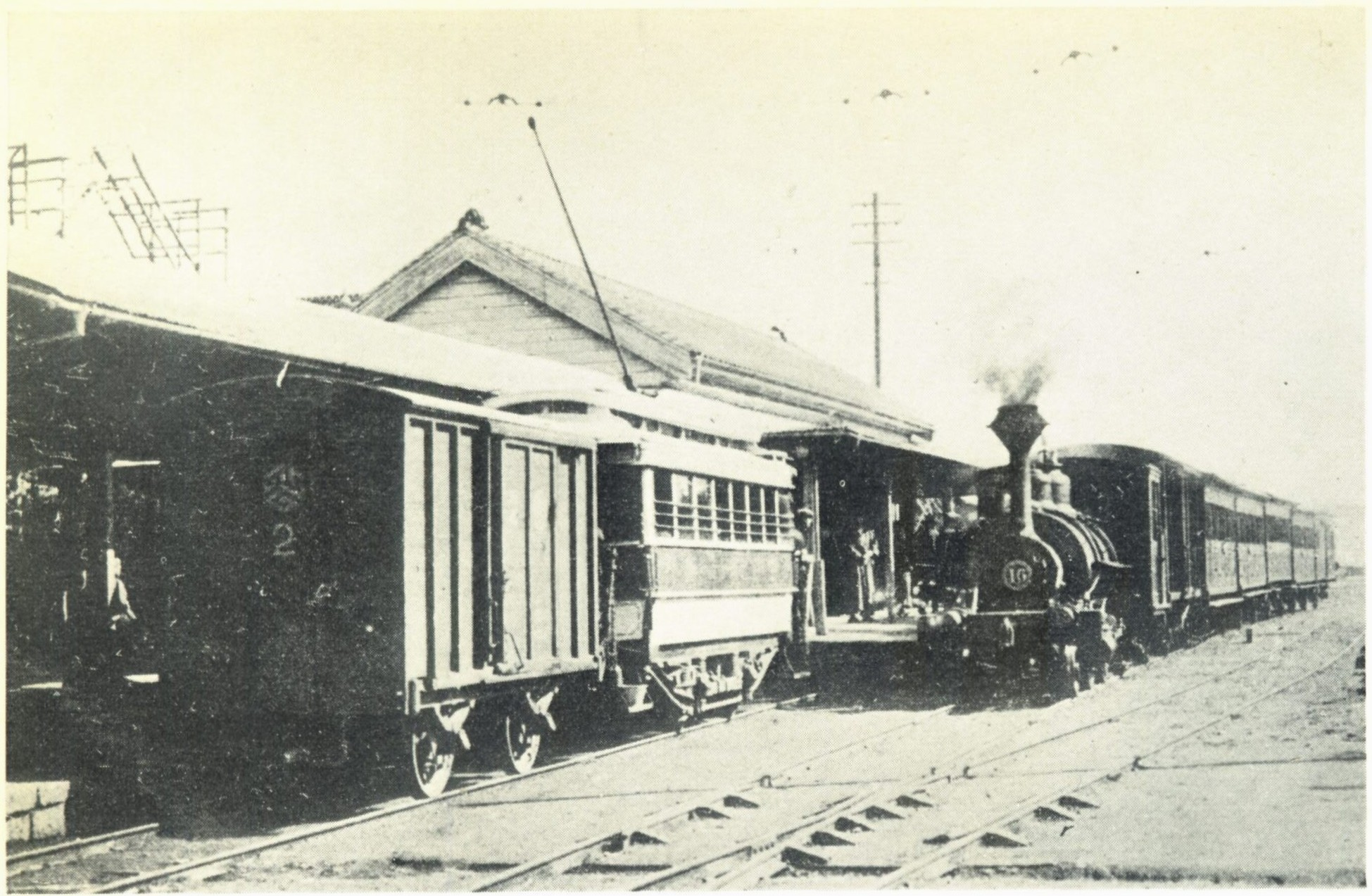 三島町駅での駿豆電気鉄道(後の伊豆箱根鉄道軌道線)の電車と本線(旧豆相鉄道、後の伊豆箱根鉄道駿豆線)の列車。撮影時期についての記載無し。蒸気機関車は元北海道炭礦鉄道15号形で、1924年には流山鉄道に譲渡された。本線は1918年に電化された。 軌道線三島町駅は1914年休止、1924年に本線乗り入れの形で再開され、再開後は風景が違うはずだが、写真が見つからないので何とも言えない。